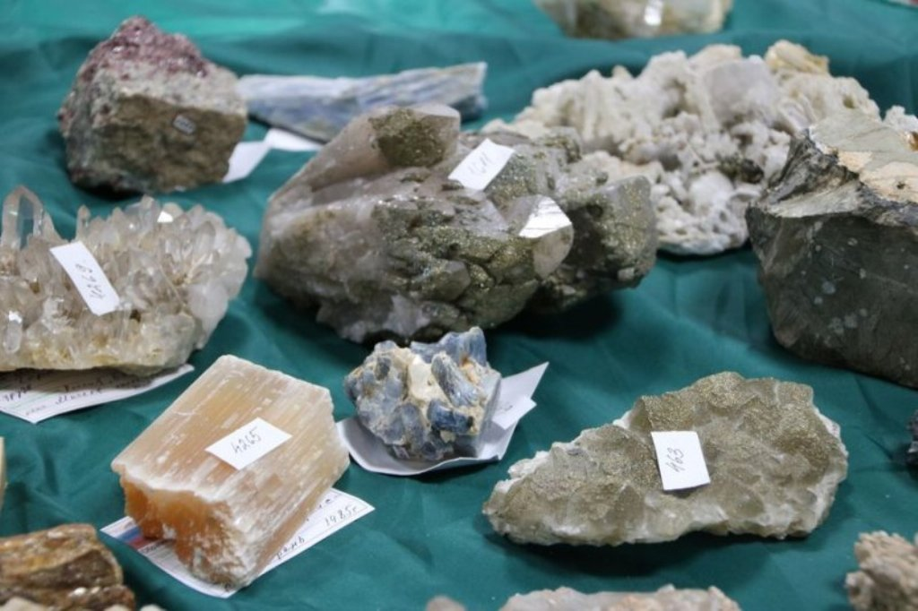 музей